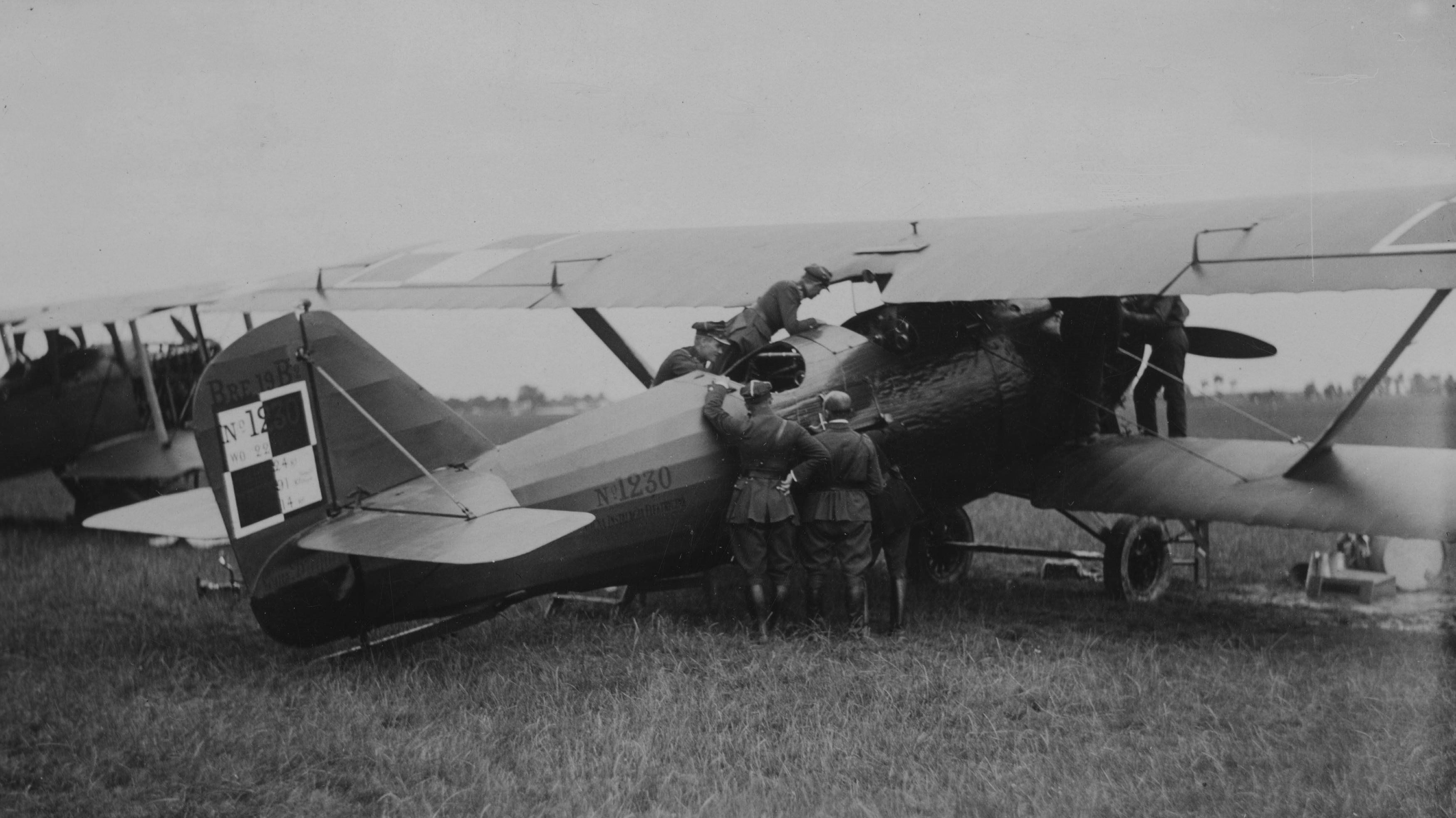 Grupa pilotów przy samolocie Breguet 19 B2.